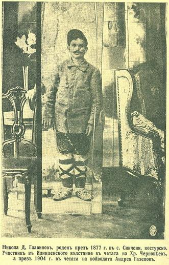 Никола Д. Главинов.